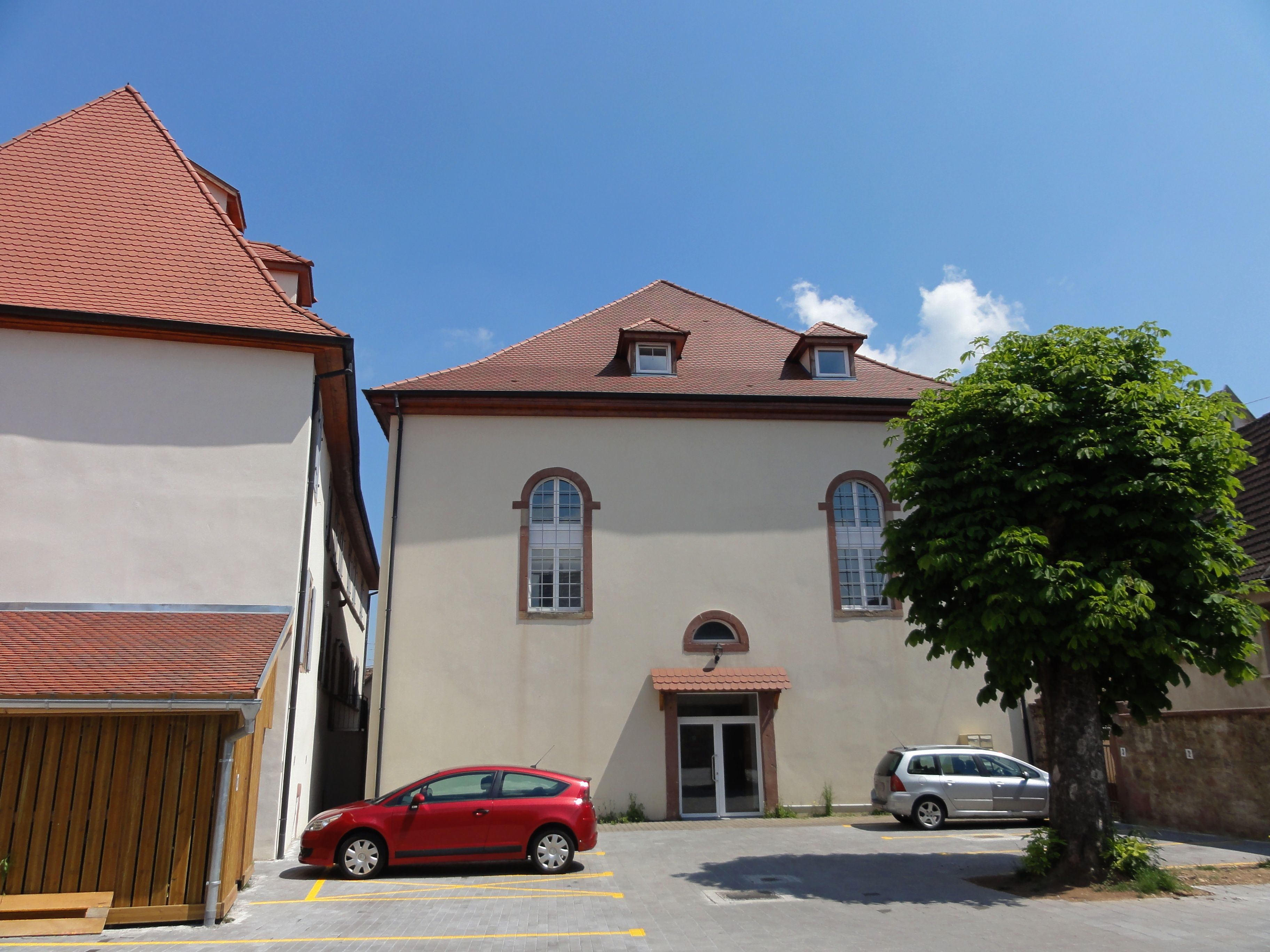 Alsace, Soultz-Haut-Rhin, Synagogue (1835-1838), rue de la Synagogue, rue des Bouchers. It is indexed in the Base Mérimée, a database of architectural heritage maintained by the French Ministry of Culture, under the references PA00085684 and IA00111950.